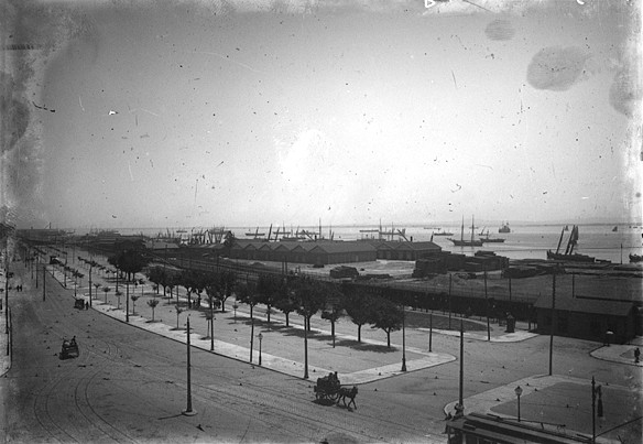 Av. 24 de Julho × Jardim de Santos.